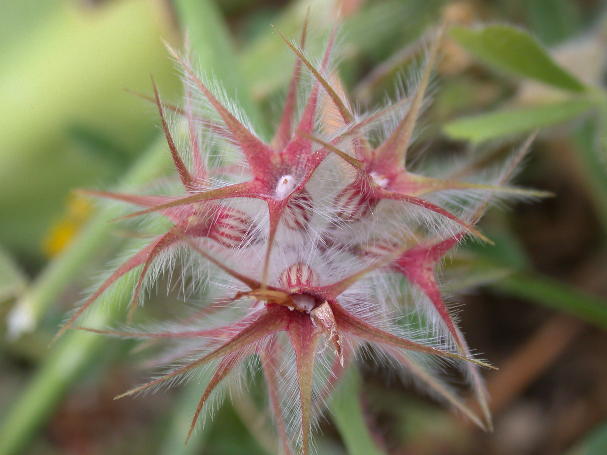 Trifolium stellatum L. (תלתן כוכבני), Mount Carmel, Israel, April 4, 2008.